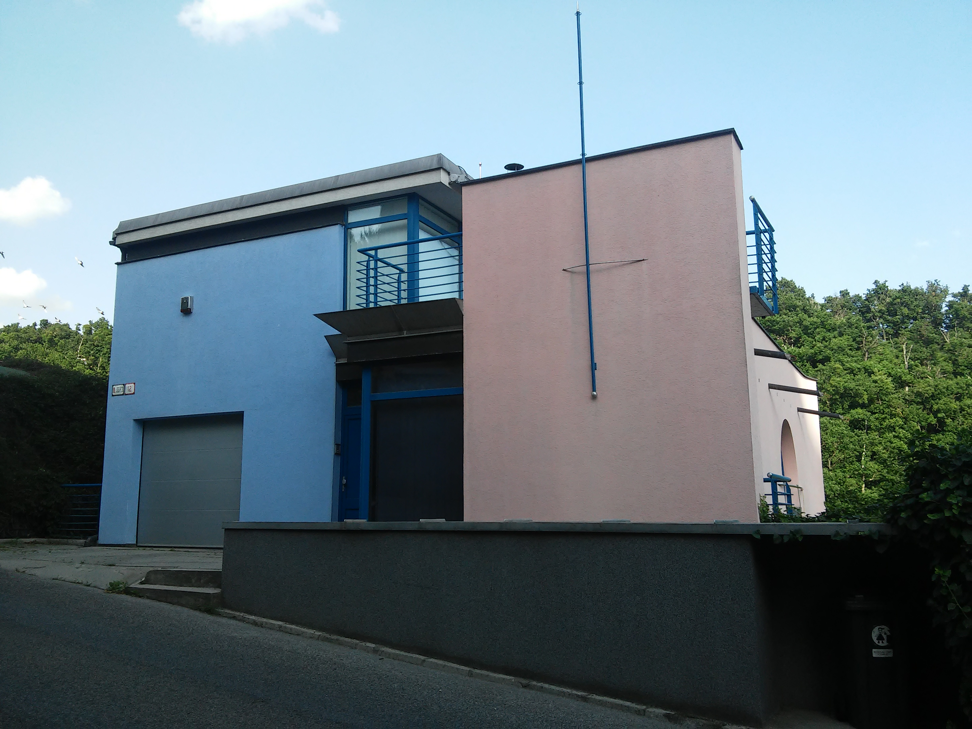 Guothova, Nové Mesto, Bratislava